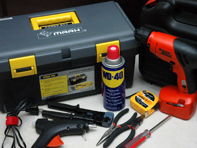 一些基本的DIY工具，DIY（自己動手做）除了是一種可以節省開銷的生活形態，也可以是一種嗜好與自我實現創意的方式。一些簡單、基本但很順手的工具，往往可以讓DIY更順利且有樂趣！照片由上傳者User:SElephant本人於2005年3月拍攝。